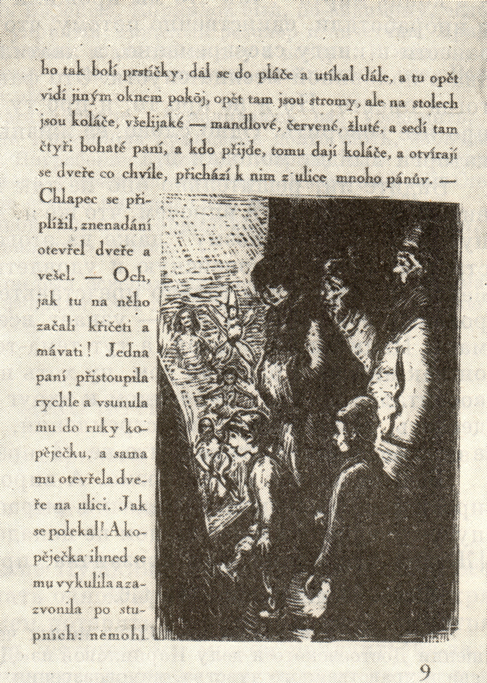 Иллюстрация А.Мейера к рассказу "Мальчик у Христа на ёлке", Прага, 1923